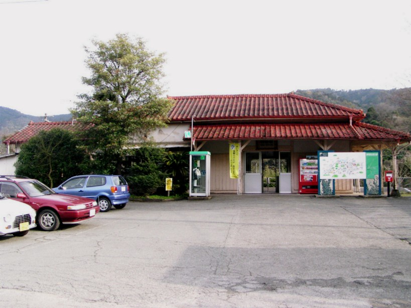 2005年3月28日に投稿者が網田駅にて撮影。